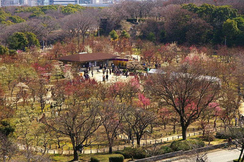 Plum Garden, Osaka Castle Park